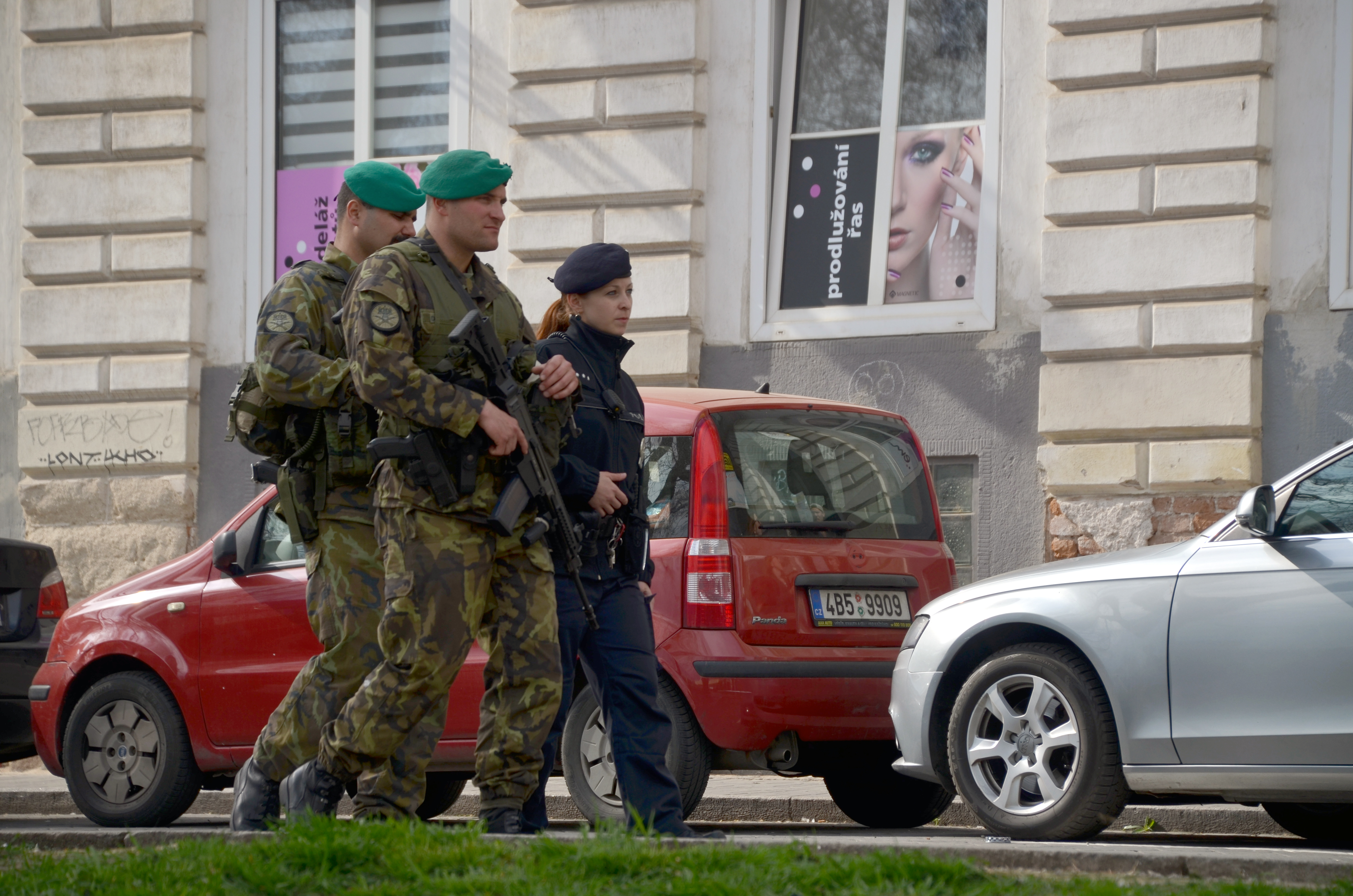 Smíšená hlídka sestávající z policisty a vojáka v Brně (po teroristických útocích v Bruselu 2016)